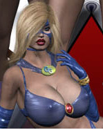 Primer plano de Got-Gal